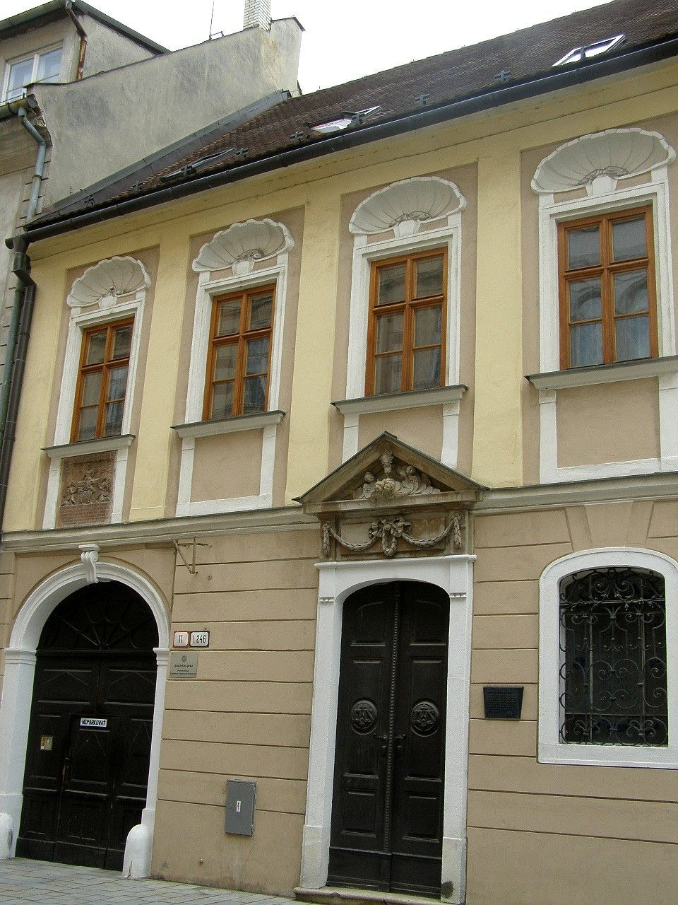 Kaplnka Kristovho tela sa nachádza v dome na Panskej ulici č. 11 v Bratislave